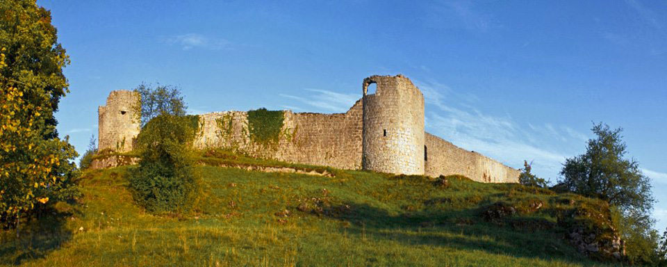 Bering und Zwinger der Burg von westlicher Richtung gesehen